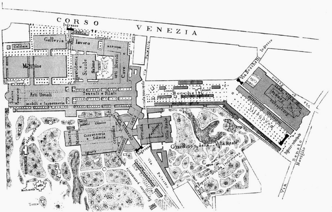 Pianta dell'Esposizione Nazionale di Milano del 1881 in una stampa dell'epoca